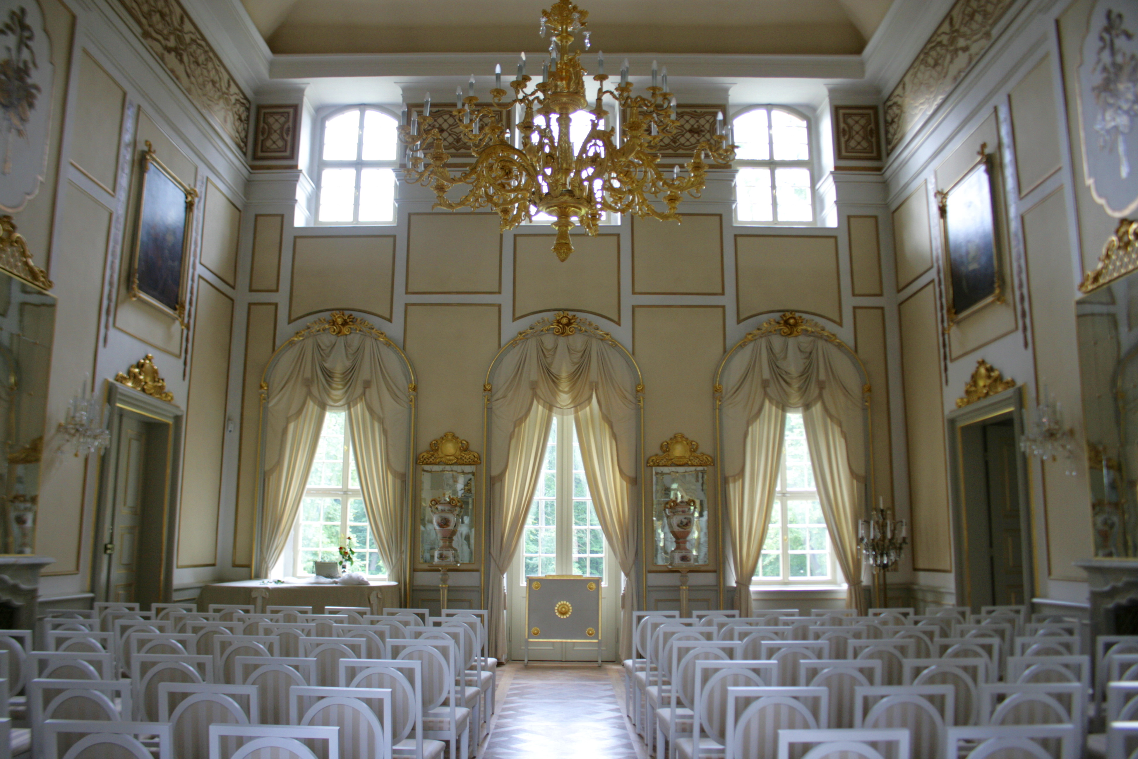 Barockschloss Rammenau in Rammenau